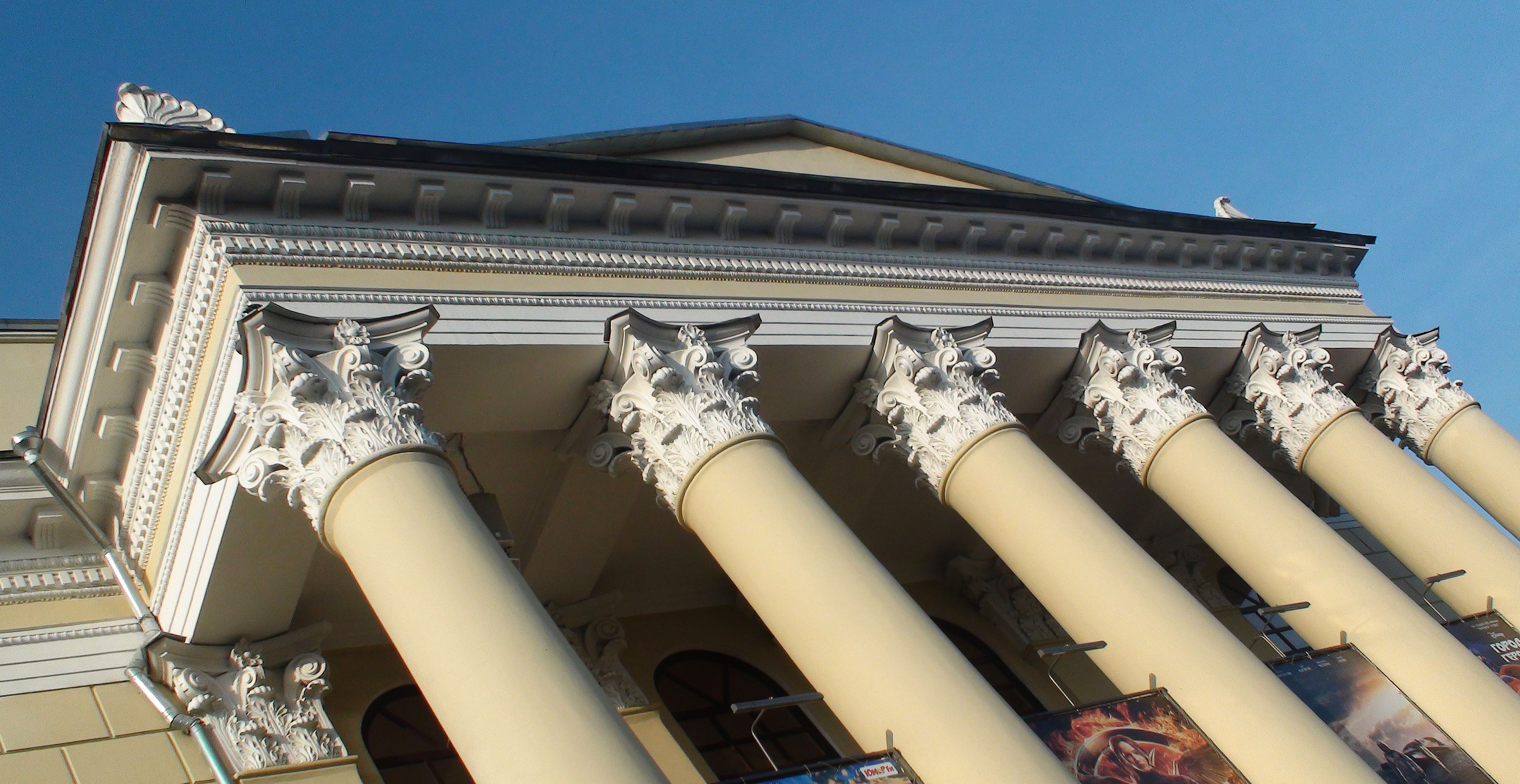 Дворец культуры "Костино"